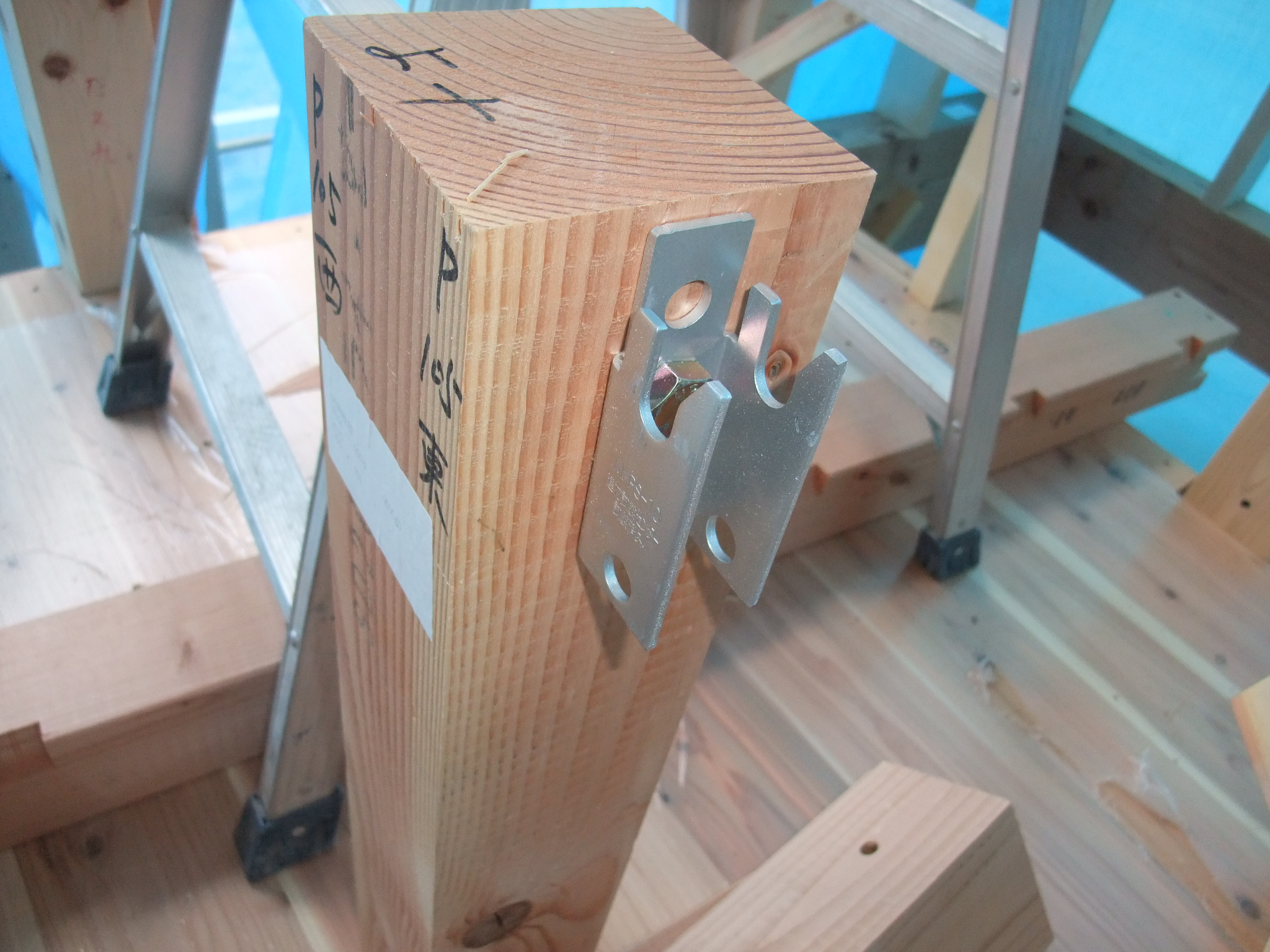 ドリフトピン工法。接合部の金具（凸側）。凹側は、梁に埋め込まれて現地搬入される。